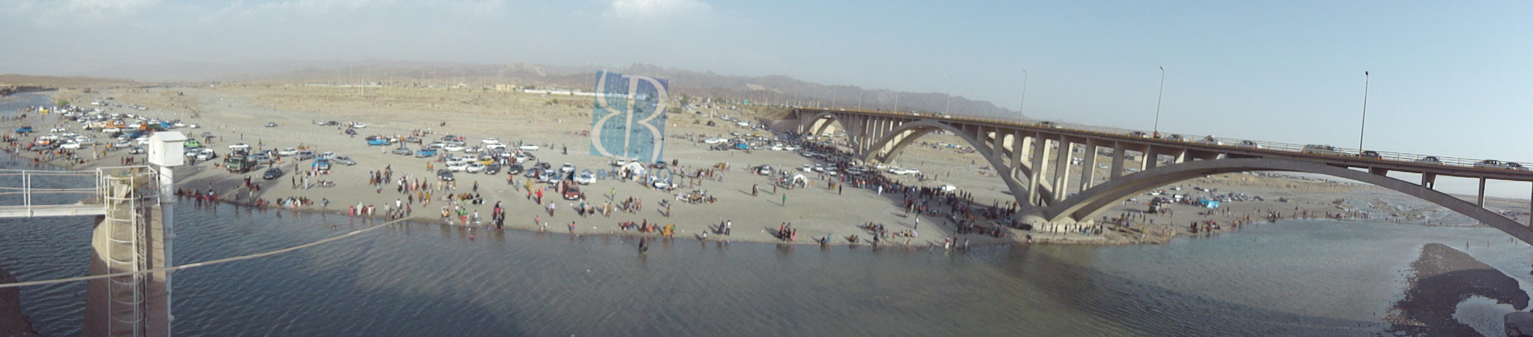 شهر رودان